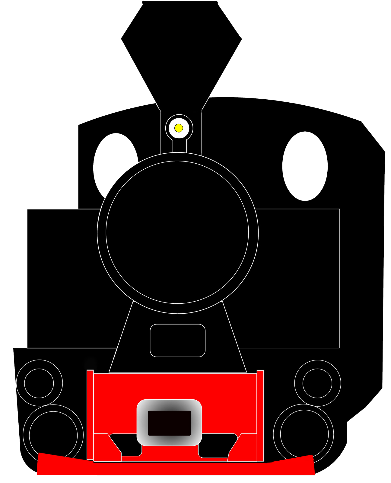 Reprezentare a locomotivei cu abur cu ecartament îngust 764 400, produsă la Reșița în anii 1950.